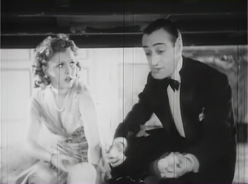 Fotogramma del film Animali pazzi (Lilia Dale e Toto) (1939). Licensing 1939